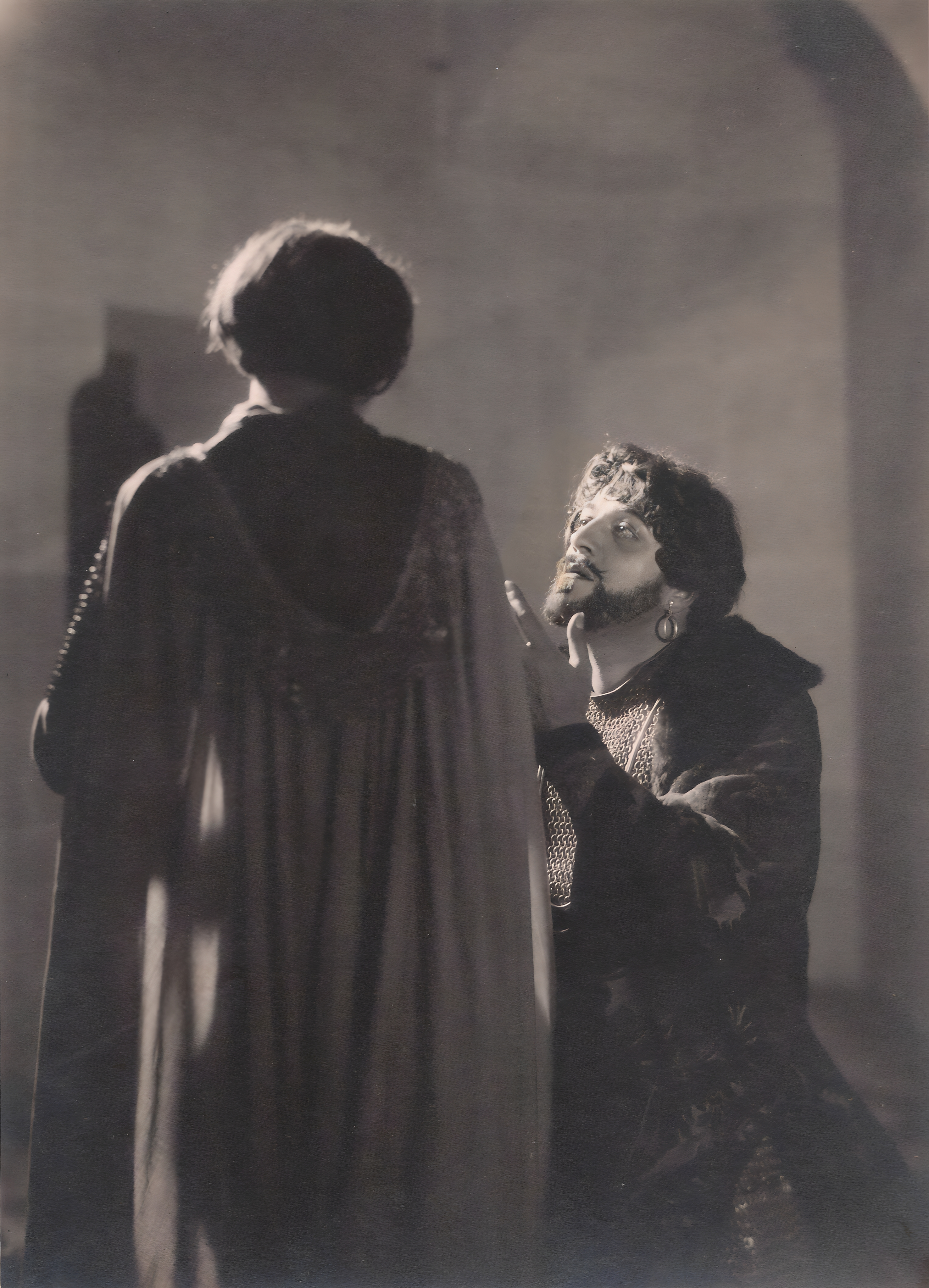 Photographie publicitaire de Simone Genevois (de dos) et Philippe Hériat dans les rôles respectifs de Jeanne d'Arc et Gilles de Rais. Tirage argentique original d'époque contemporain de la sortie du film La Merveilleuse Vie de Jeanne d'Arc, fille de Lorraine (1929).